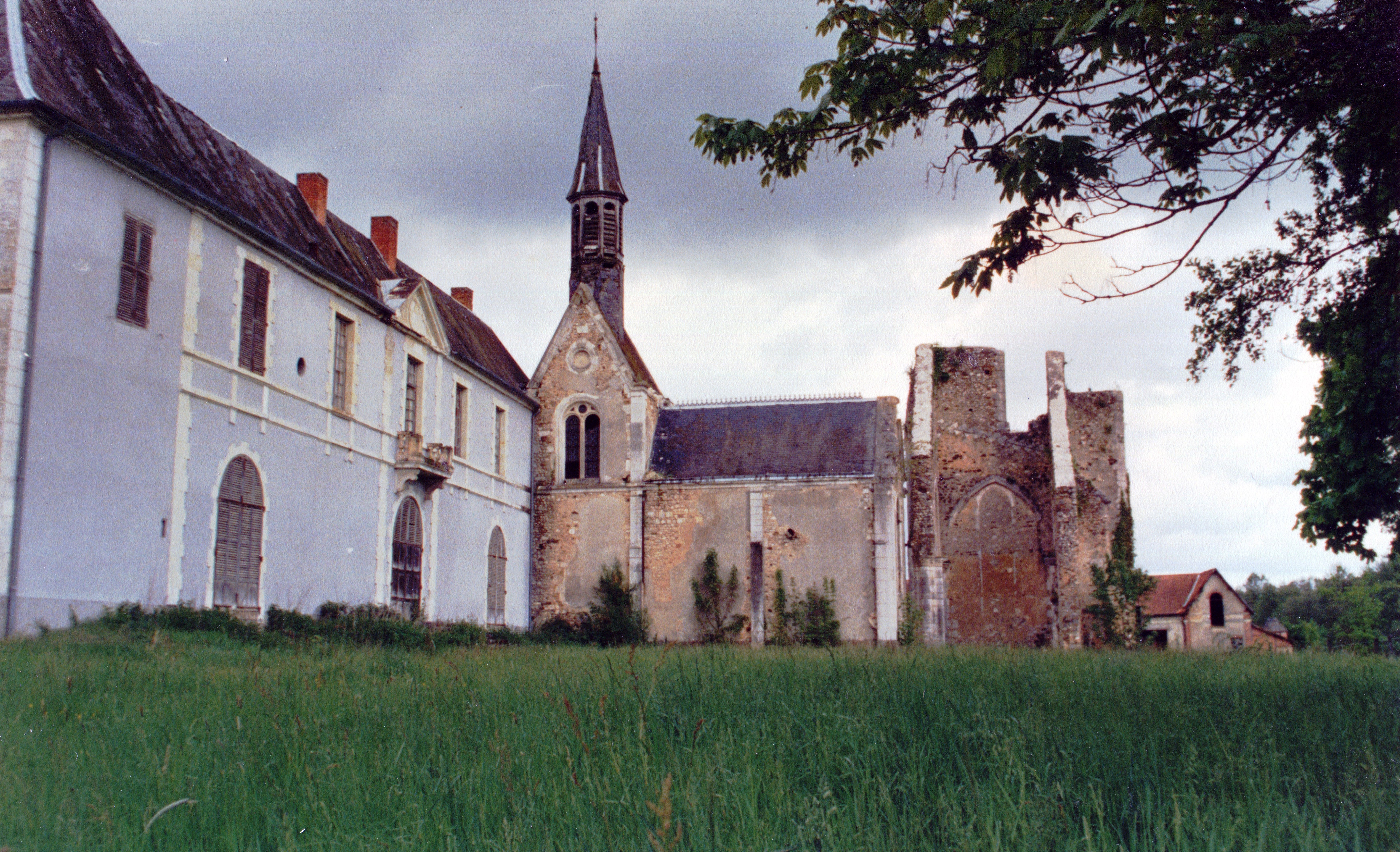 L'ancienne Abbaye de Loroy en 1987. L'abbaye est un des bâtiments présumés d'être "Le domaine mystérieux" dans le livre "Le Grand Meaulnes" d'Alain Fournier.